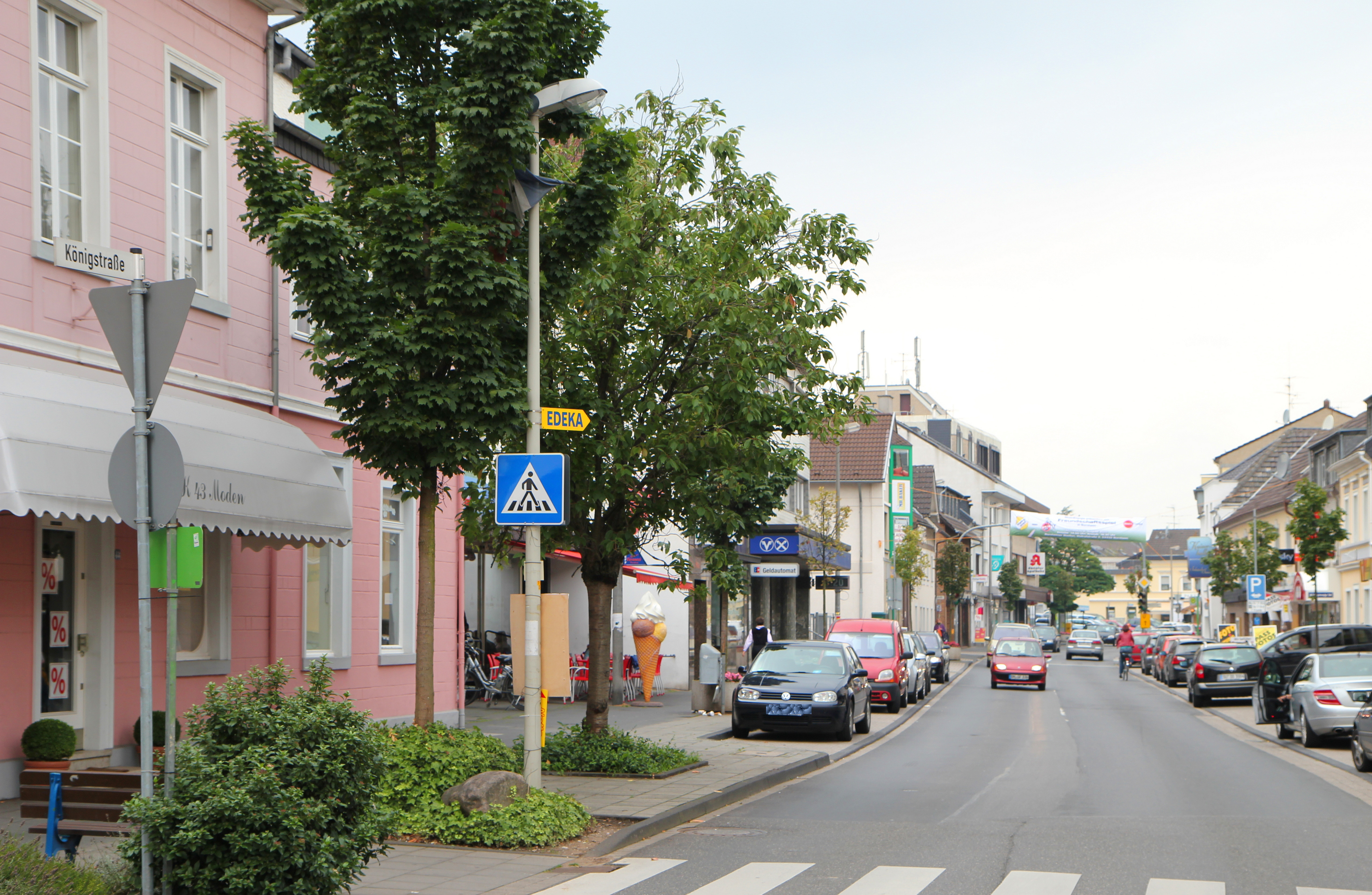 Bornheim, Abschnitt der Königstraße im Zentrum